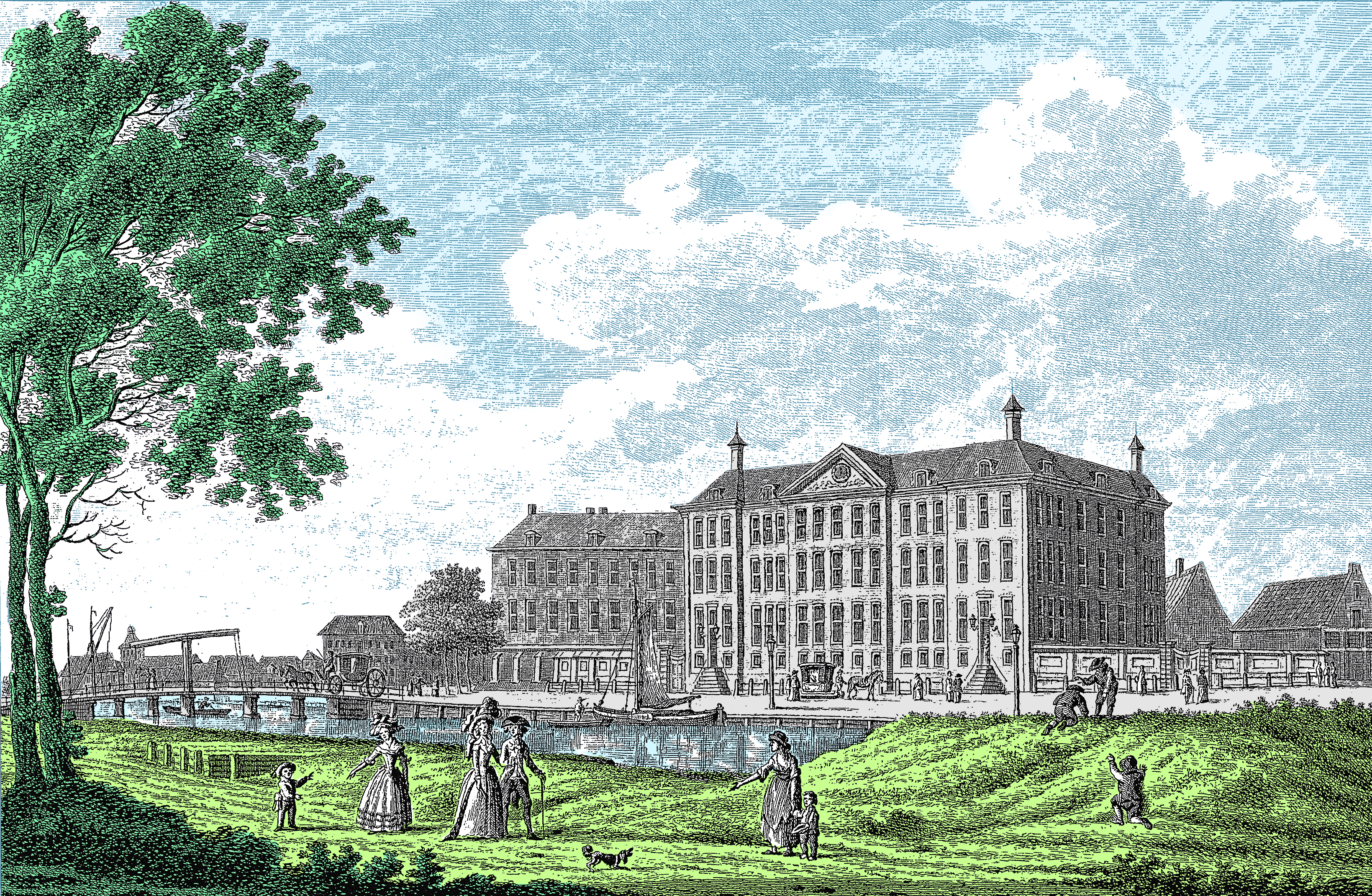 Gravure ELOMVH. Eind 18-de Eeuw